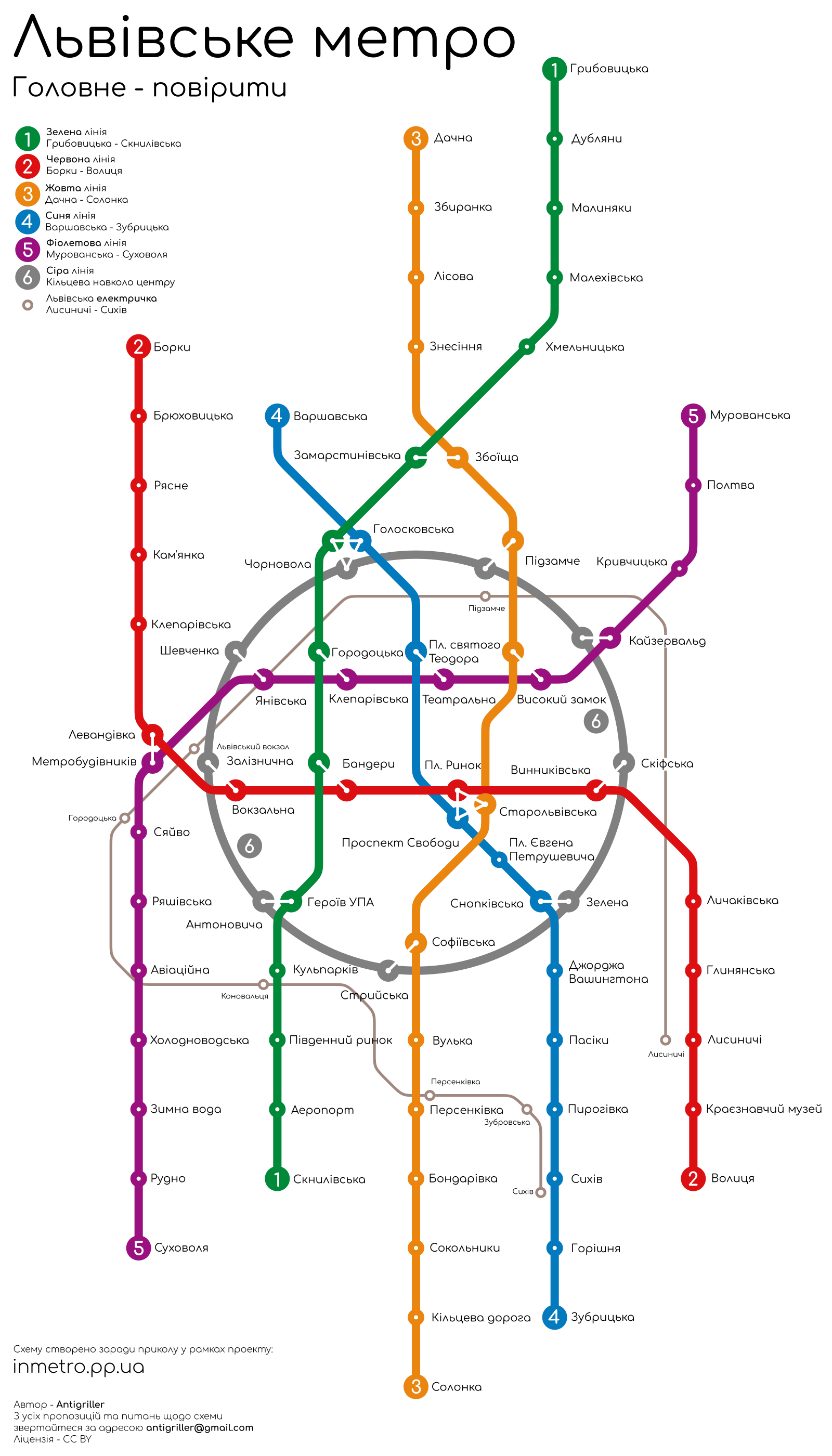 Фантазійний варіант схеми майбутнього Львівського метро із 5 діаметральними та 1 кільцевою лінією а також із лінією міської електрички.